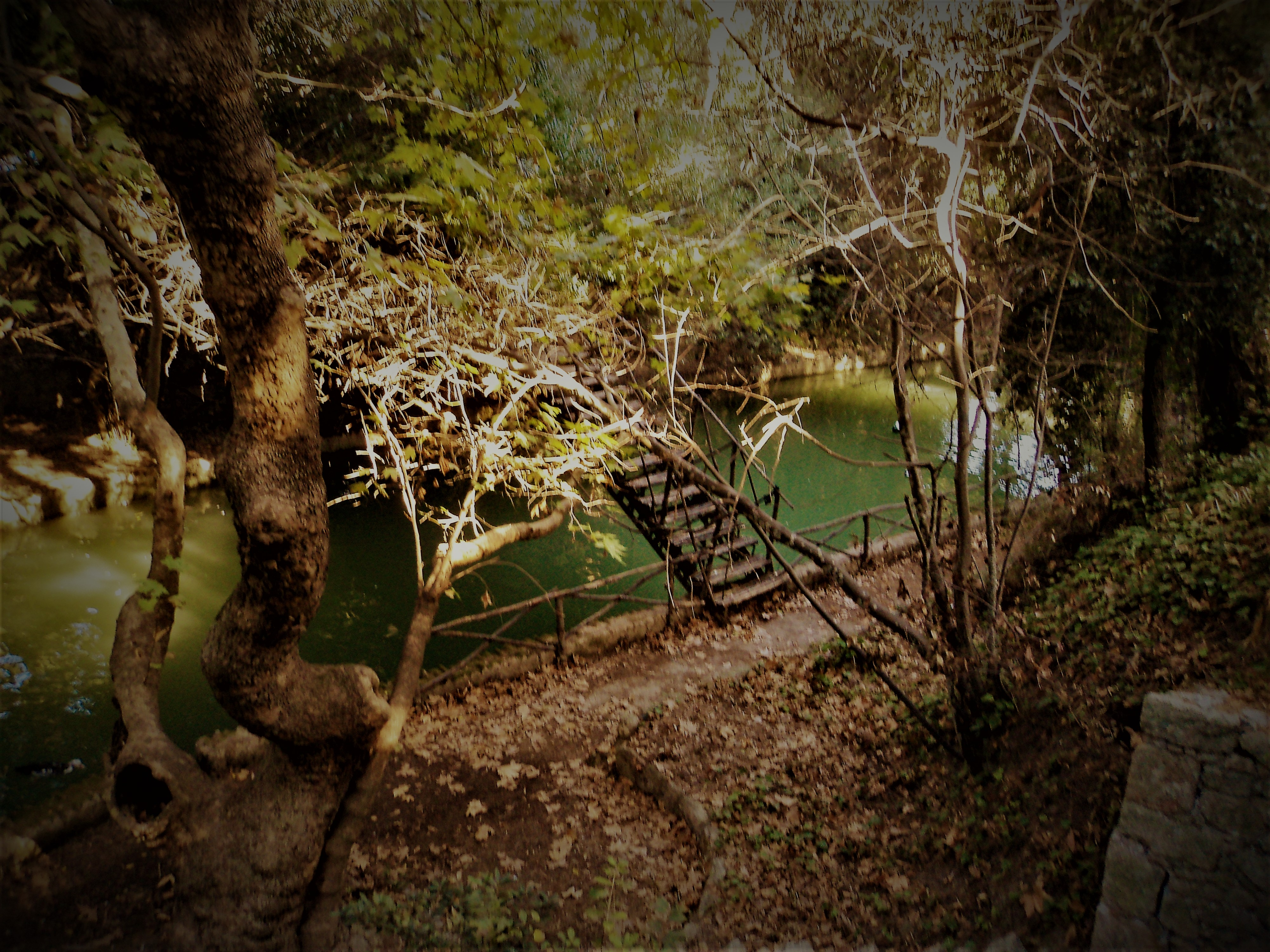 Το Πάρκο Ροδίνι